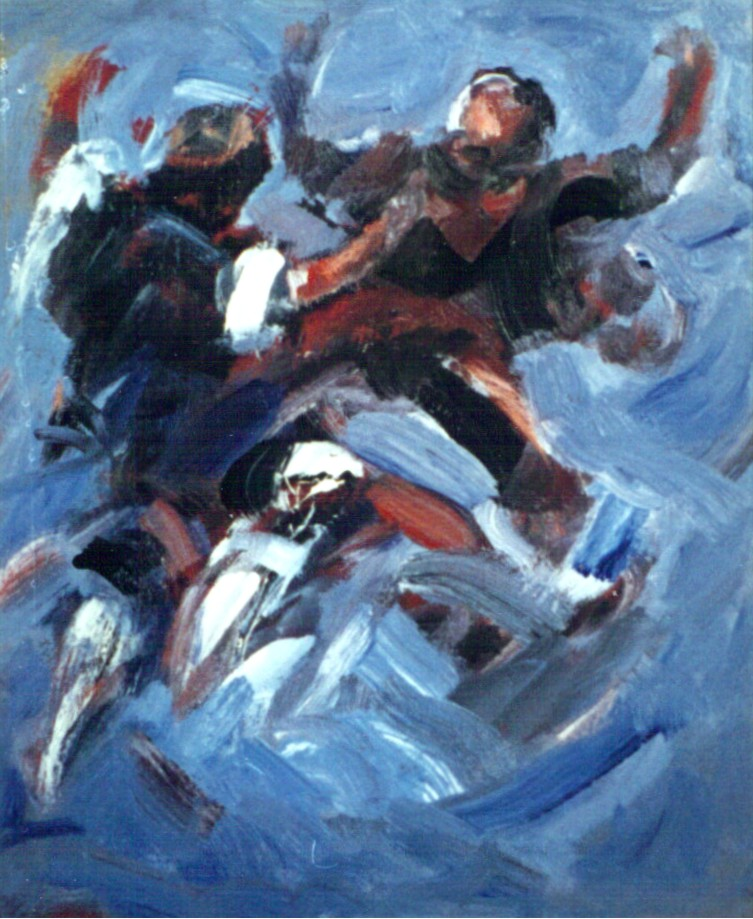 Ruizanglada - Jota en azules 61x50 Acrílico sobre tabla 1996.